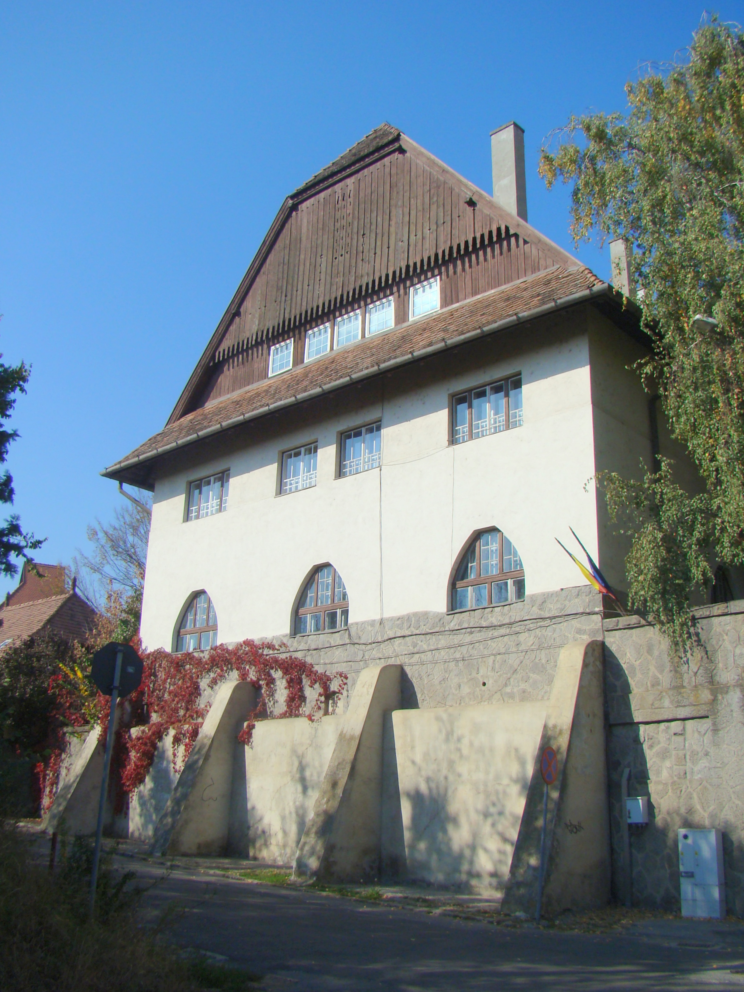 Fostul ansamblu al administrației Uzinelor Comunale, azi R. A. Aquaserv și S.C. Energomur S.A., municipiul Târgu Mureș Str. Kos Karoly 1A și 1 B 1910 - 1913